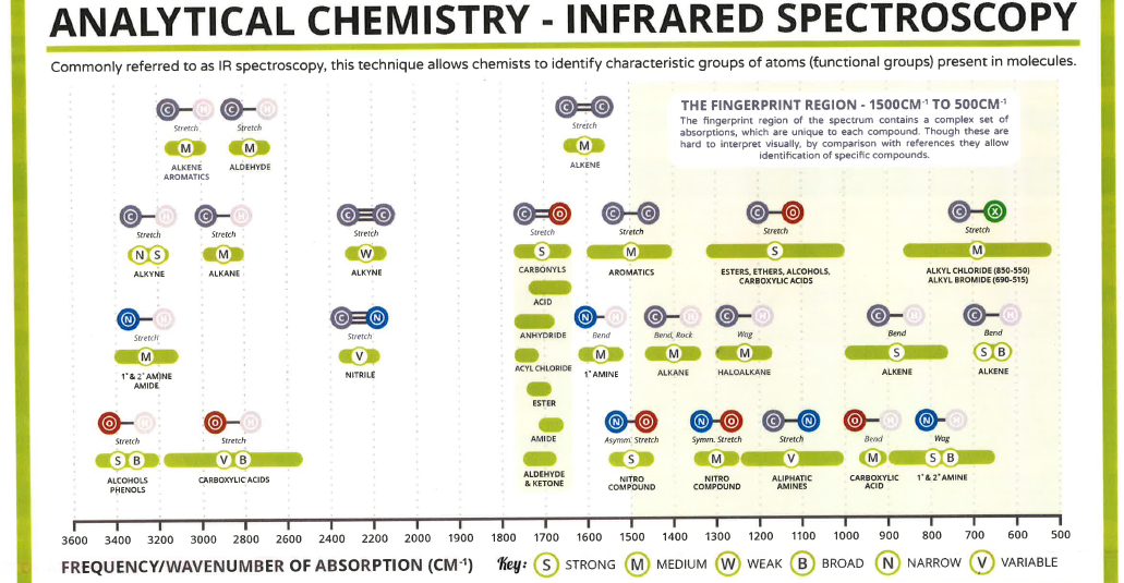 Fra Compound Interest: 1: Ovenstående tabel viser sammenhængen mellem bølgetal og forskellige funktionelle grupper. Under hver funktionel gruppe ses en cirkel med et bogstav i, der kan angive intensitet og form af absorptionsbåndet.